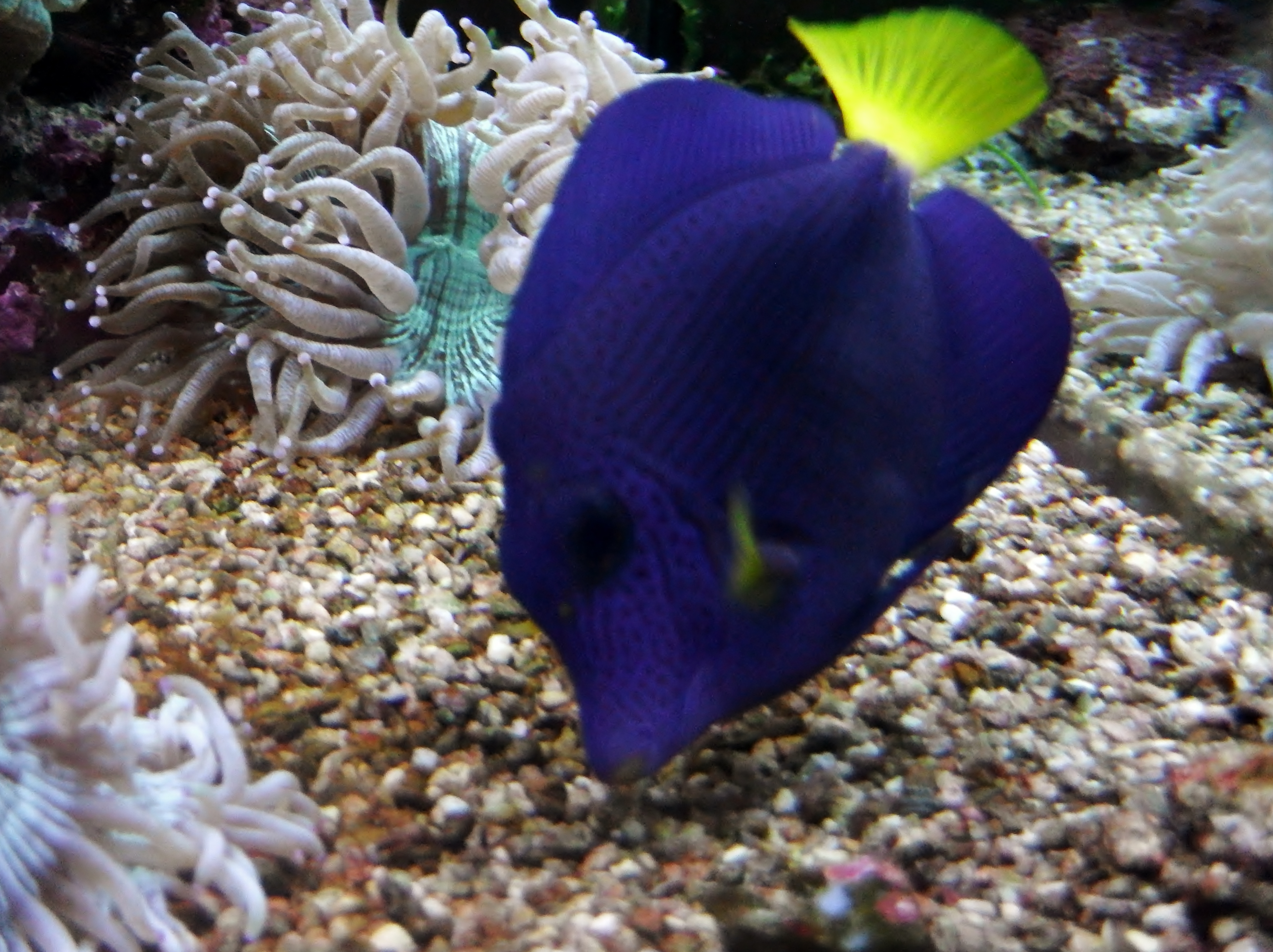 Zebrasoma xanthurum en acuario de arrecife